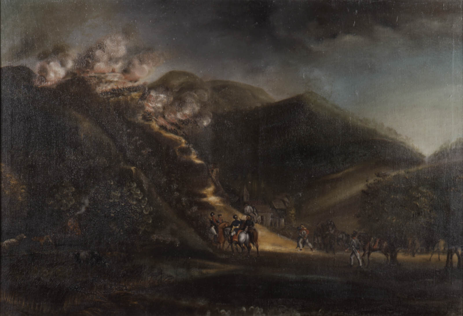 Óleo en tela de la Batalla de la Cuchilla de El Tambo, por José María Espinosa Prieto, Fecha: 1850. Dimensiones: 81x121 cm No. Registro: 2517